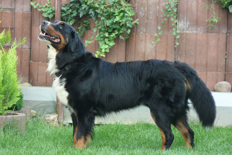 Berner Sennenhund Othello.